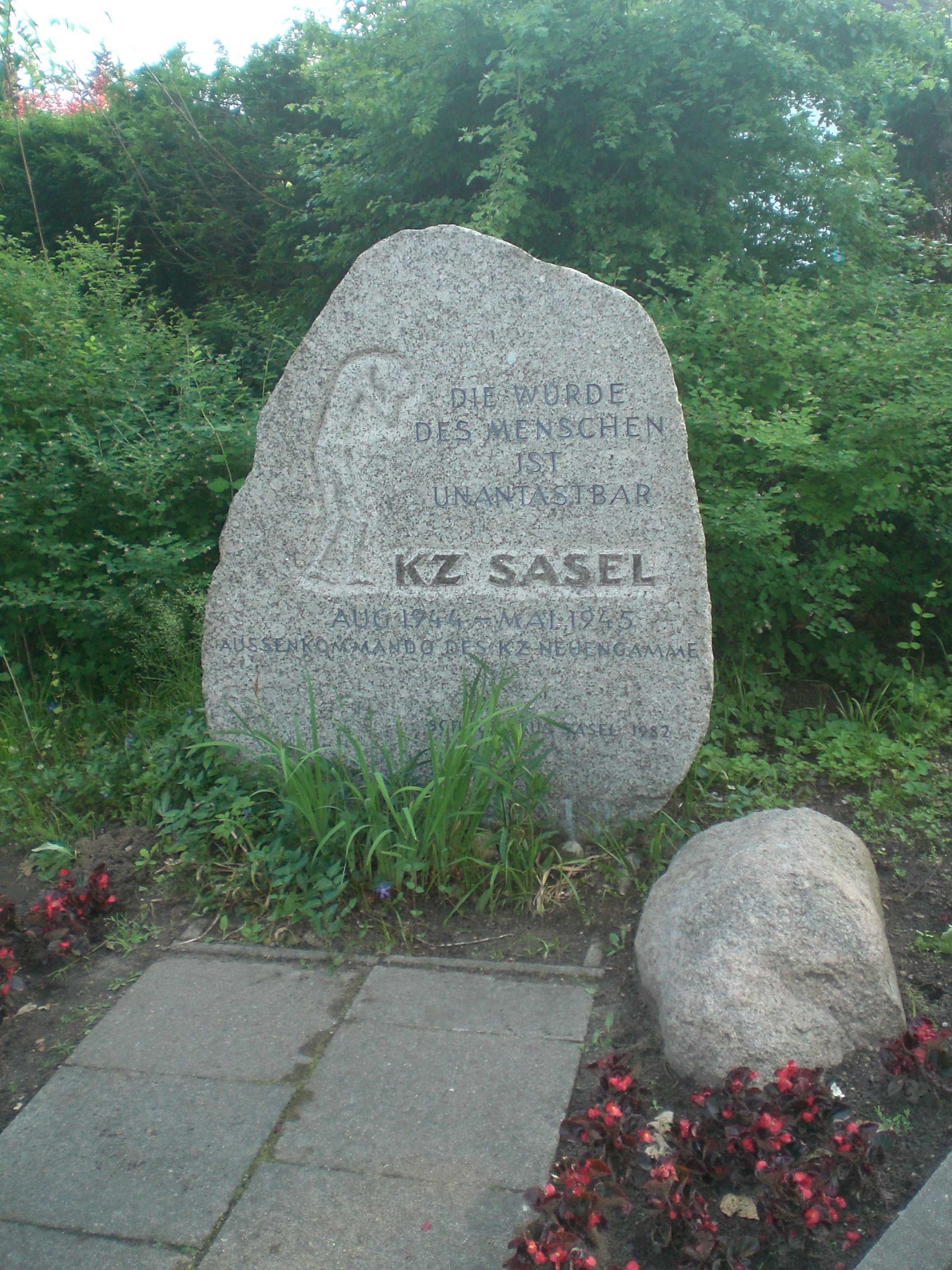 Gedenkstein für die Opfer im KZ-Außenlager Sasel, verlegt auf Initiative von Schülerinnen und Schülern des Gymnasiums Oberalster von 1982 - Feldblumenweg, Ecke Petunienweg